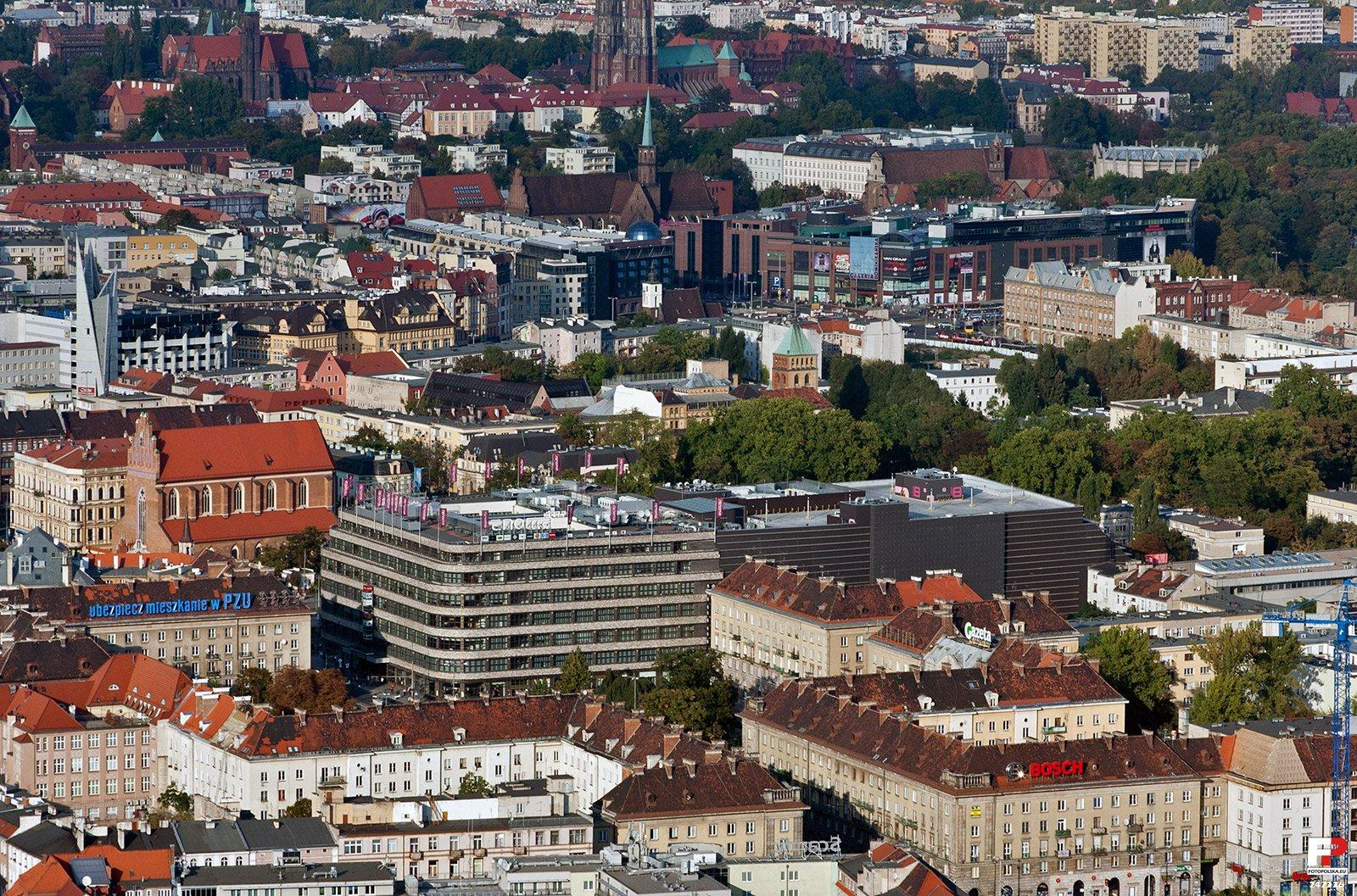 Dom towarowy Renoma w szerszym kontekście, aż po Galerię Dominikańską. Widok z dachu Sky Tower`a.